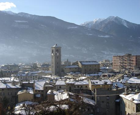 Panorama della città di Sondrio